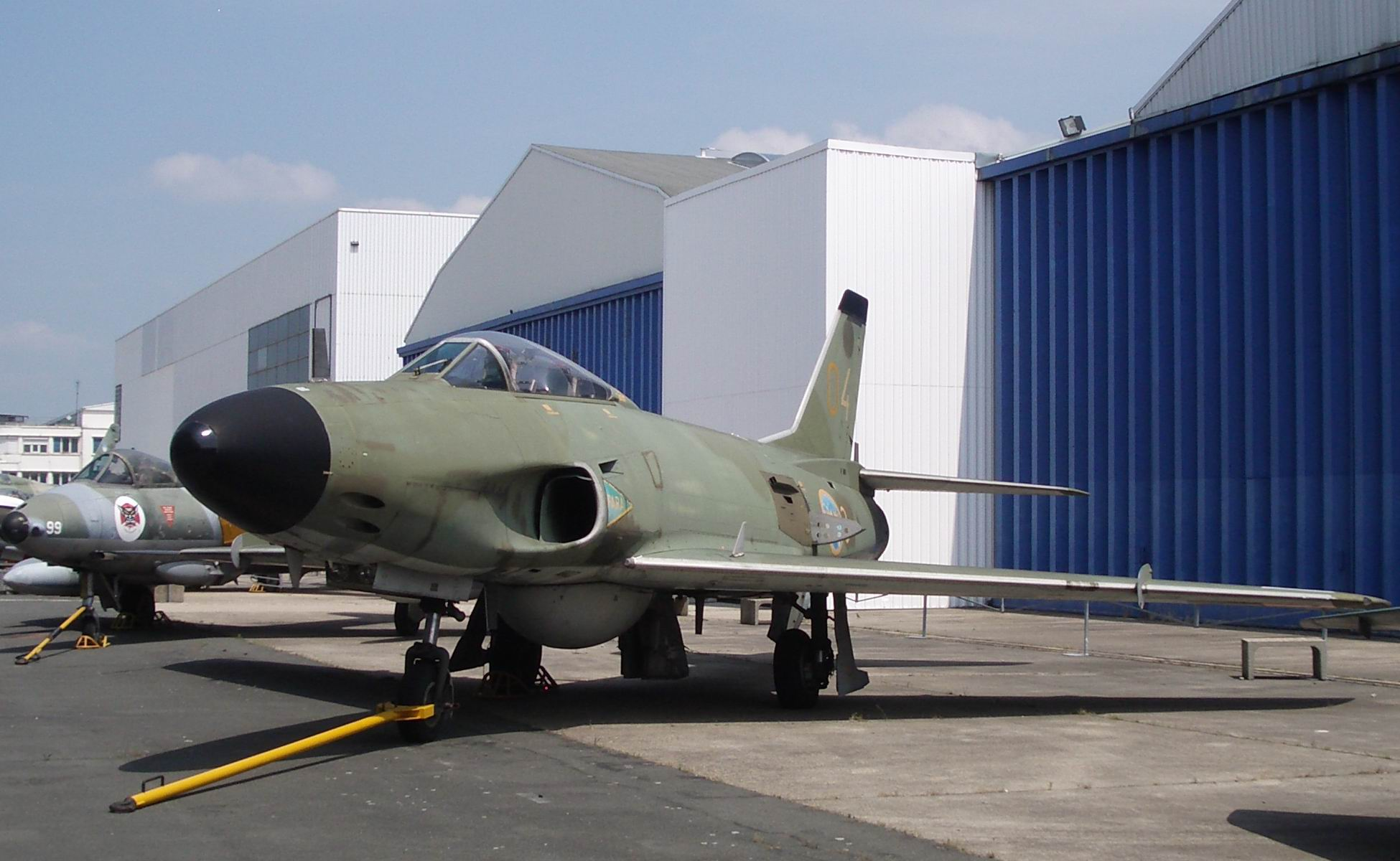 Saab 32 Lansen suihkuhävittäjä Musée de l'Air et de l'Espace-ilmailumuseossa, Le Bourgetin (Pariisin lähellä) lentokentälläm kesällä 2006. Museossa ei ole valokuvaukselle asetettuja rajoituksia.